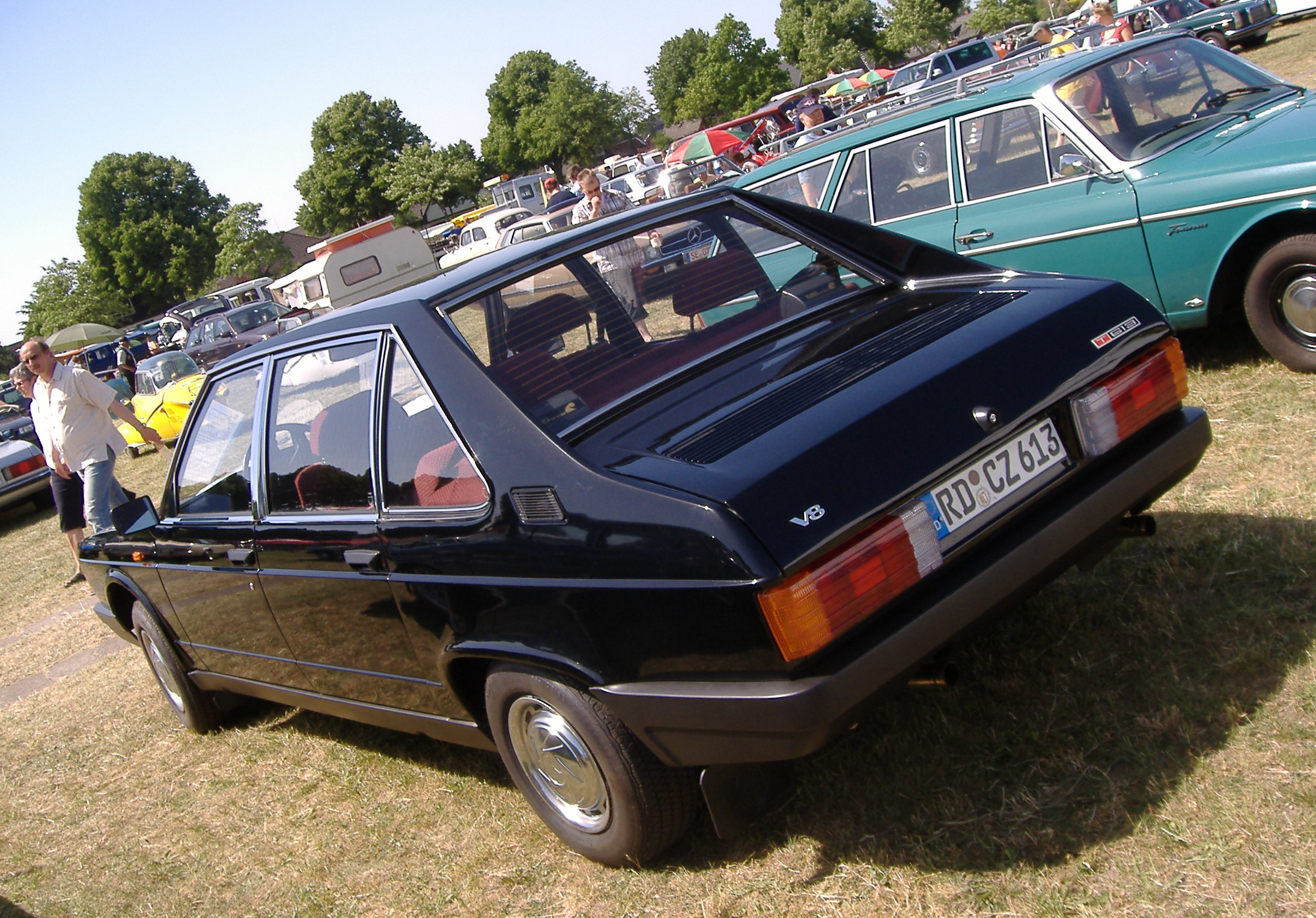 Tatra T613 V8 Heckansicht